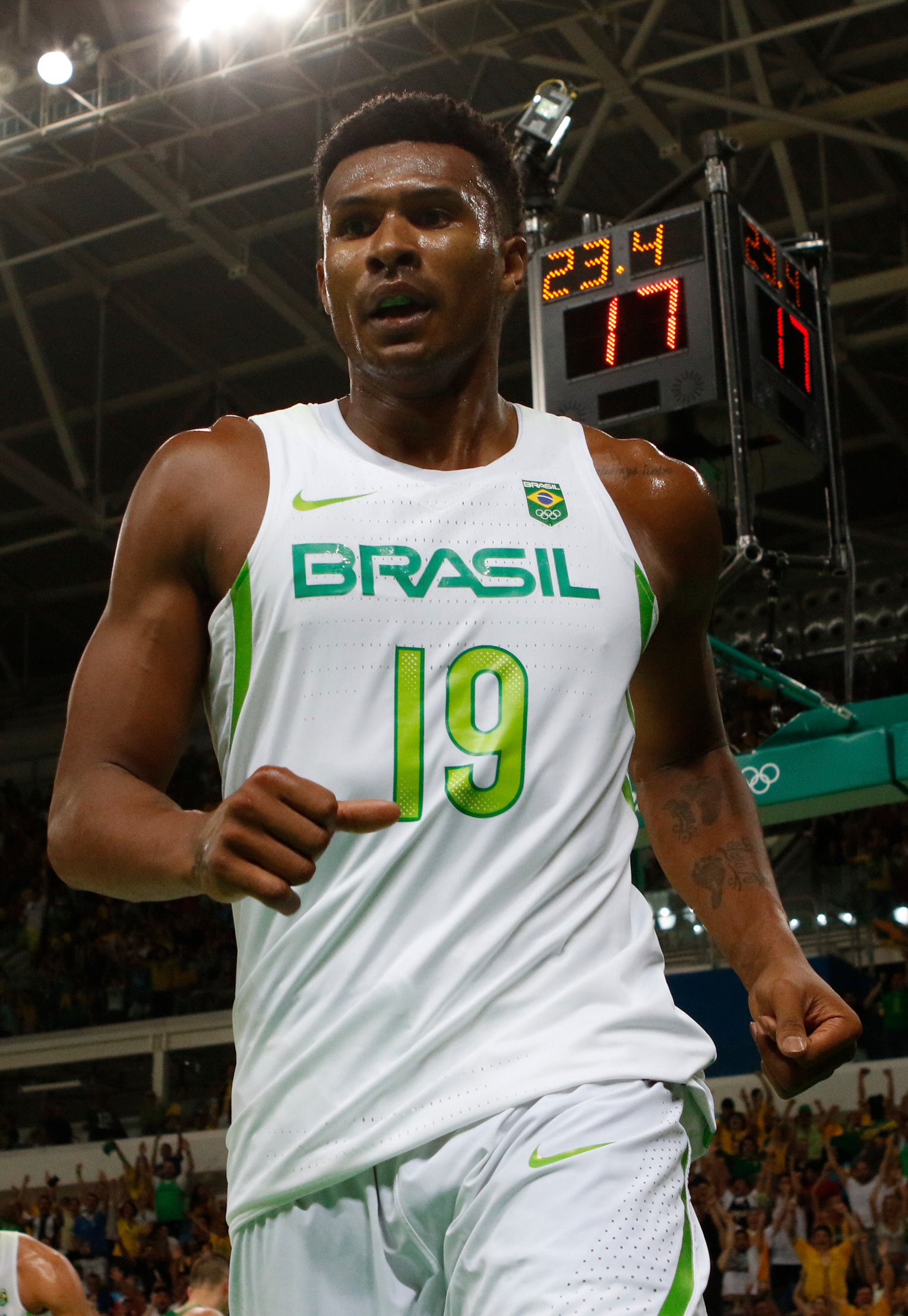 Rio de Janeiro - Basquete masculino do Brasil derrotado pela Lituânia por 76 a 82 na estria nos Jogos Olmpicos Rio 2016, na Arena Carioca, no Parque Olmpico. (Fernando Frazão/Agência Brasil)